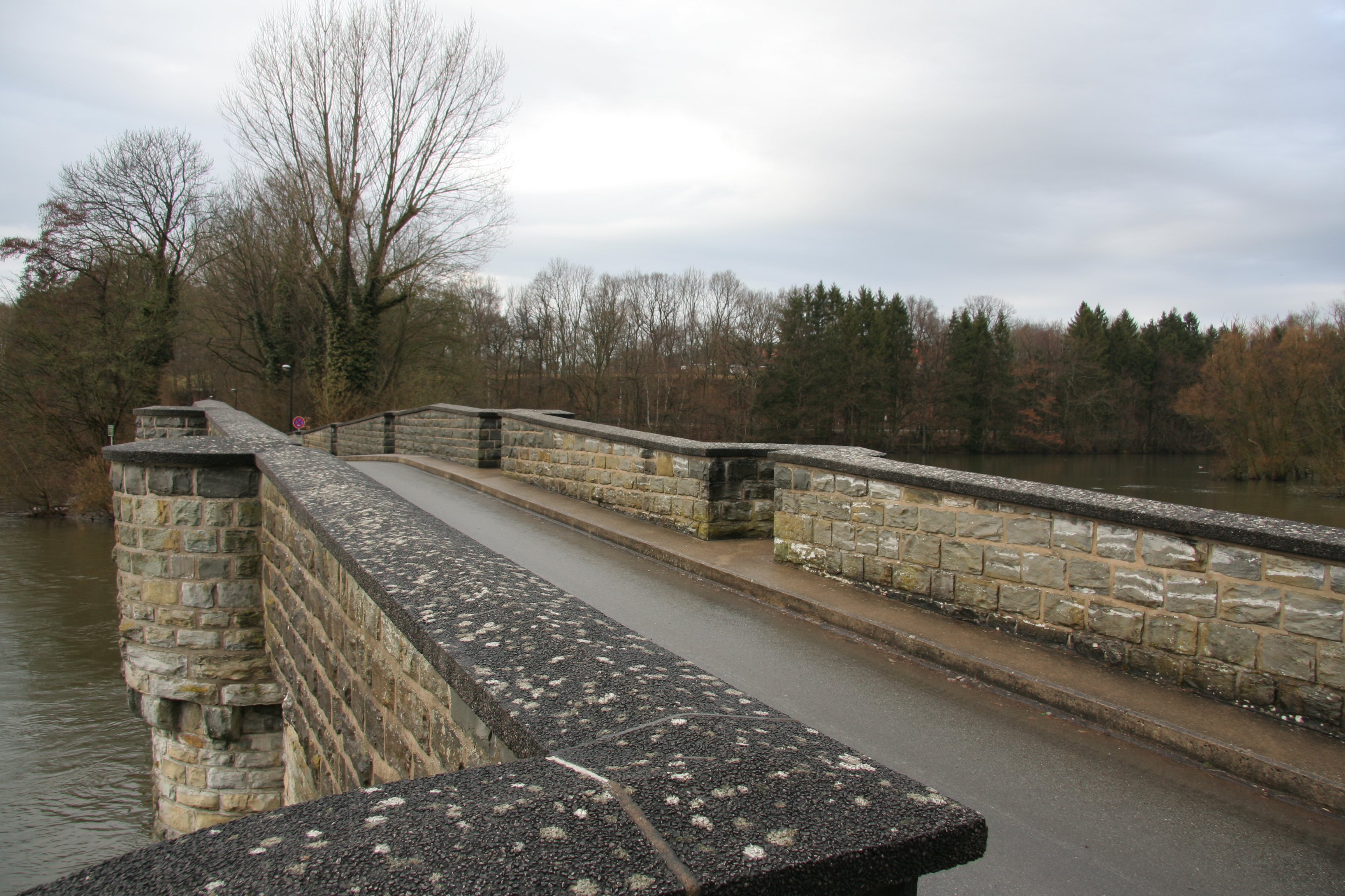 Kanzelbrücke an der Möhne